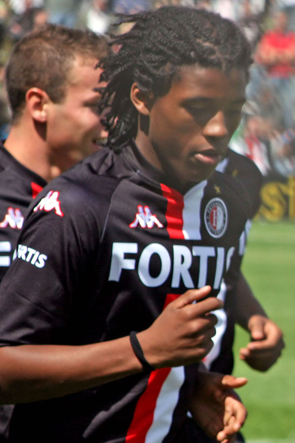 Georginio Wijnaldum (Feyenoord)